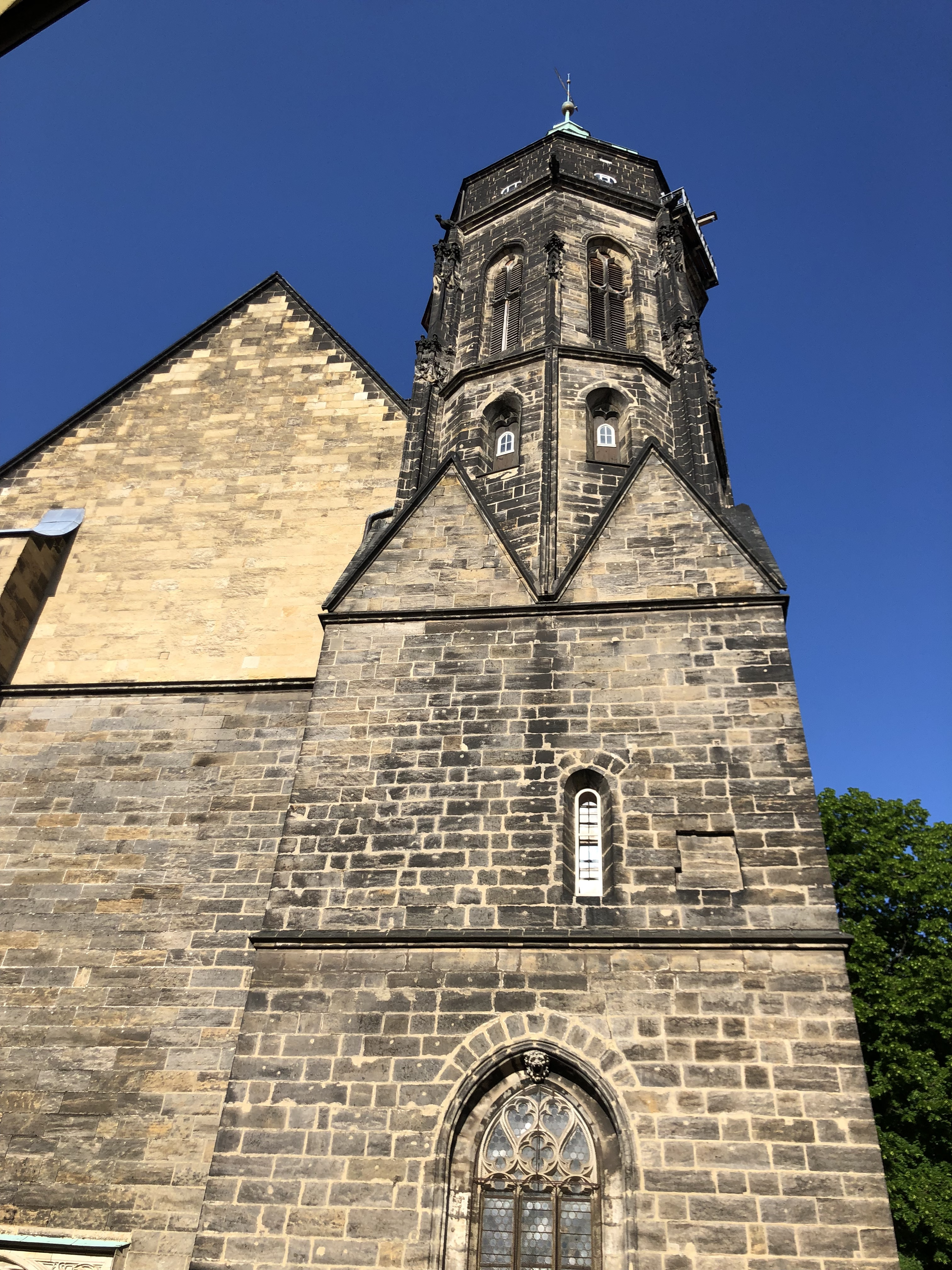 Kostel panny Marie v Pirně